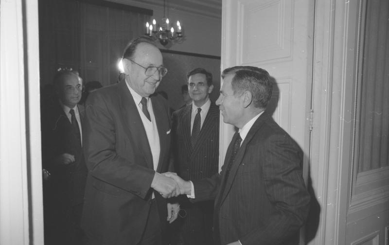 Bundesminister Genscher in Ungarn 23. - 24. November 1989